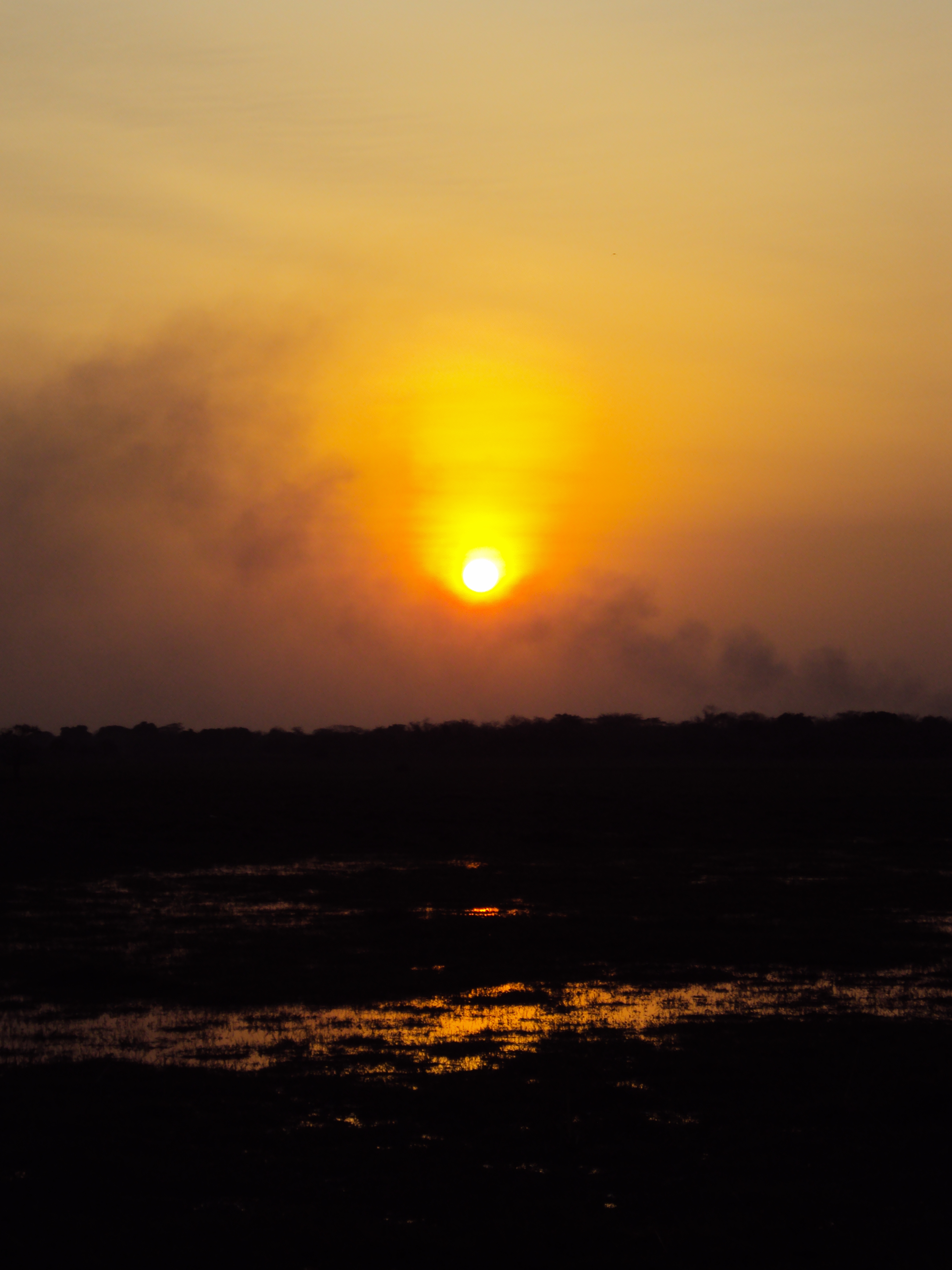 Tomada en 2011, viajando por los Llanos Venezolanos, esta foto es en la carretera entre Achaguas y Mantecal, Estado Apure. Se puede llegar en cualquier tipo de vehículo pues cuenta con carretera asfaltada.